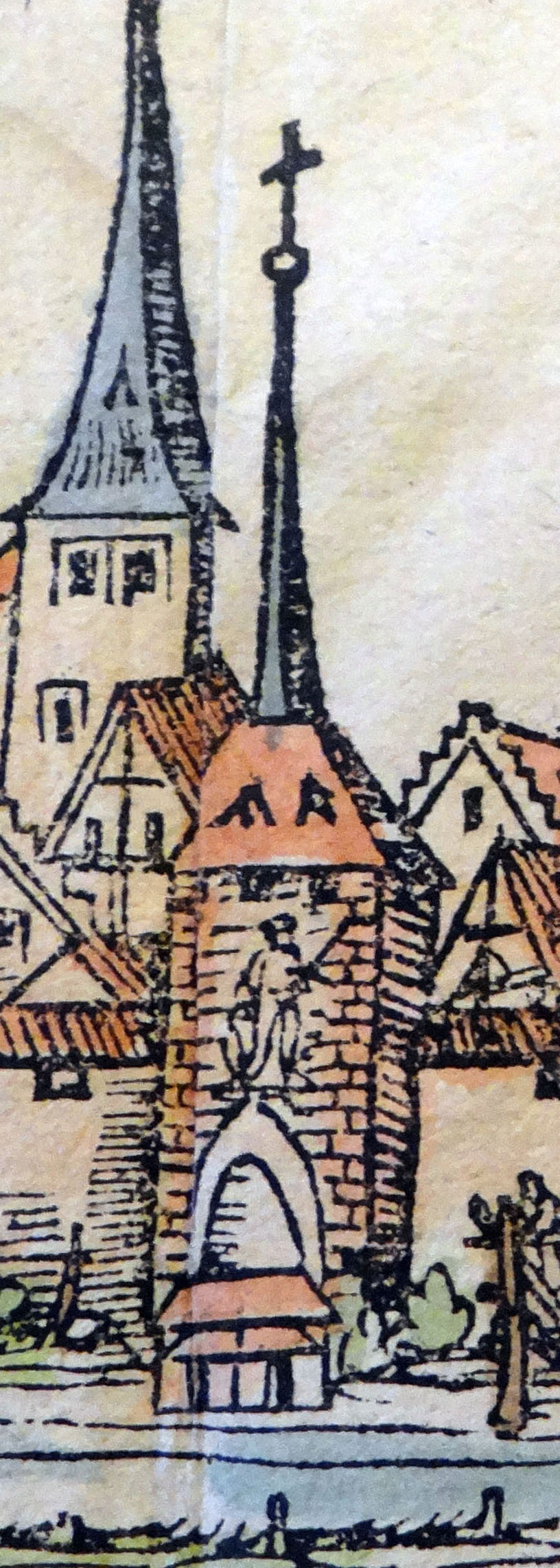 Mayfels, Worms. Detail aus: Sebastian Münster: Cosmographey. Hencicpetrina, Basel 1572, S. DCXCIII–DCXCVI. Stadtarchiv Worms: Abt. 217 Nr. 1478.